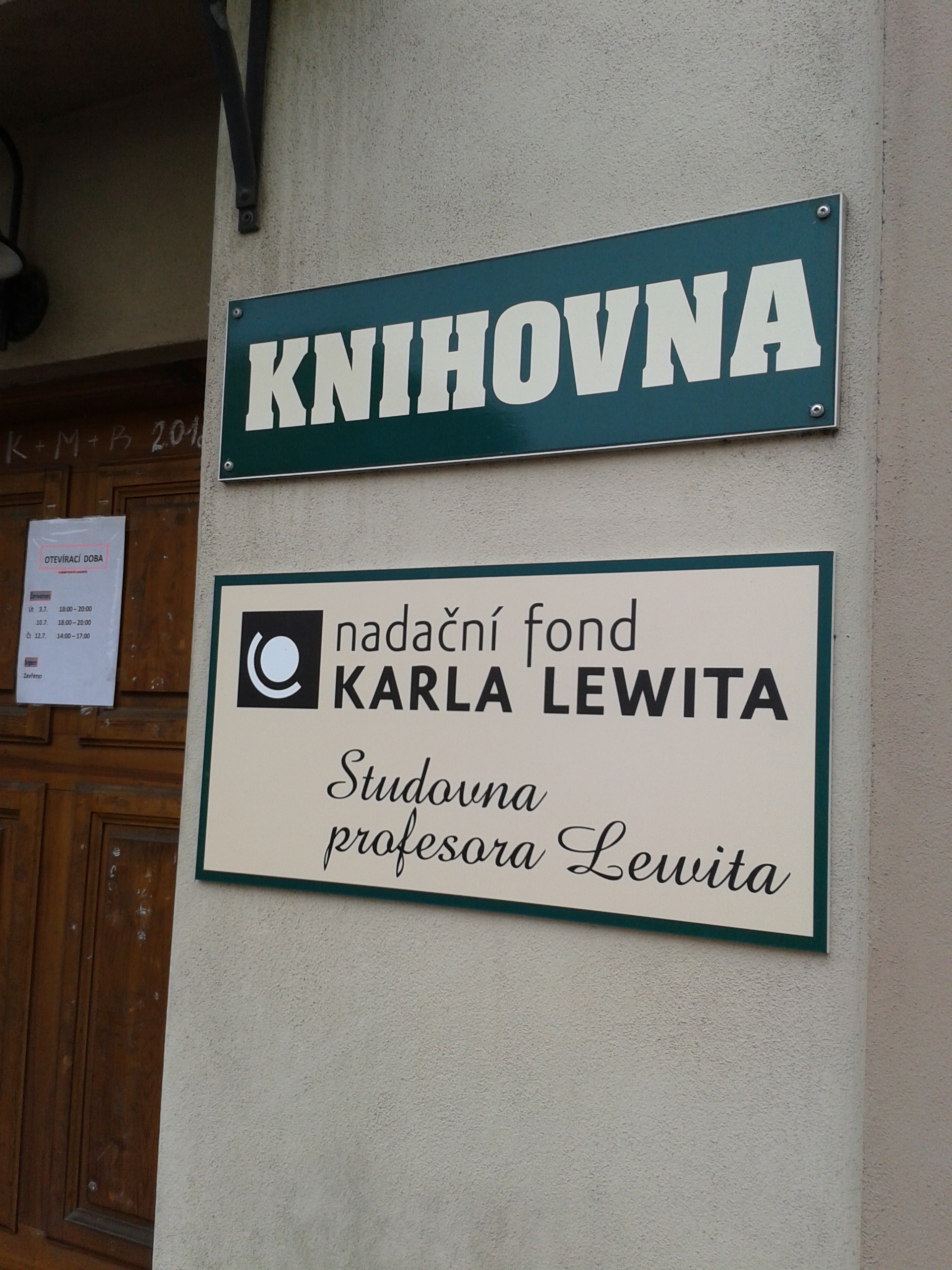 Informační cedule - knihovna a sídlo Nadačního fondu profesora Karla Lewita (1916-2014) v Dobřichovicích u Prahy, jehož cílem je: uchovávat, spravovat a dále rozvíjet funkční způsob myšlení prof. Lewita ve vyšetření a léčbě pacientů; vzdělávat (pomocí přednášek a konferencí) odbornou i laickou veřejnost v oboru rehabilitace a fyzioterapie; zřídit a udržovat informační webové stránky; vydávat odborné publikace; udržovat profesní kontakty se zahraničními žáky profesora Karla Lewita a jejich pokračovateli; vytvářet sítě vyškolených lékařů a fyzioterapeutů, kteří by v praxi ověřovali platnost diagnostiky a terapie funkčních poruch.